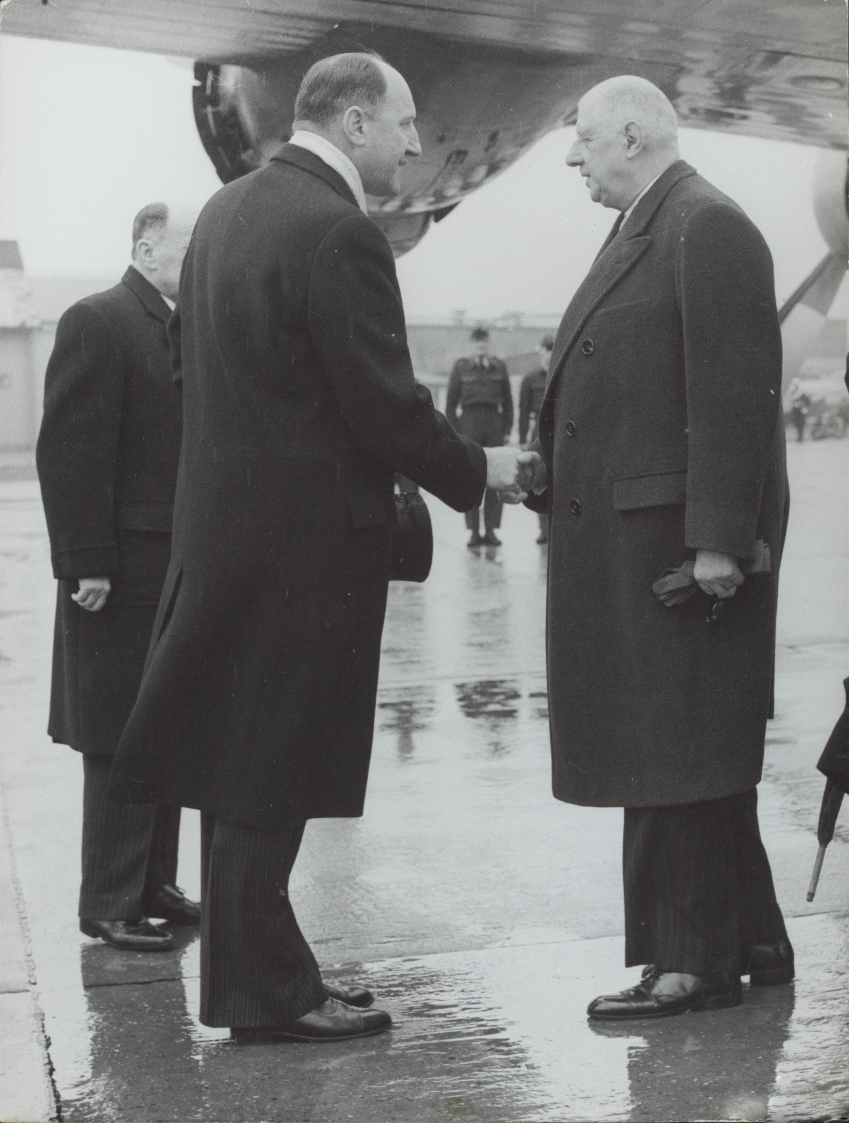 Collectie / Archief : Fotocollectie Rijksvoorlichtingsdienst Eigen Reportage / Serie : [ onbekend ] Beschrijving : actualiteiten binnenland, dhr j. luns Datum : 16 maart 1963 Locatie : Amsterdam, Noord-Holland Trefwoorden : ministers, presidenten Persoonsnaam : Gaulle, Charles de, Luns, J.A.M.H., Luns, Joseph Fotograaf : Fotograaf Onbekend / Anefo Auteursrechthebbende : Nationaal Archief Materiaalsoort : Foto (zwart/wit) Nummer archiefinventaris : bekijk toegang 2.24.10.02 Bestanddeelnummer : 137-0057